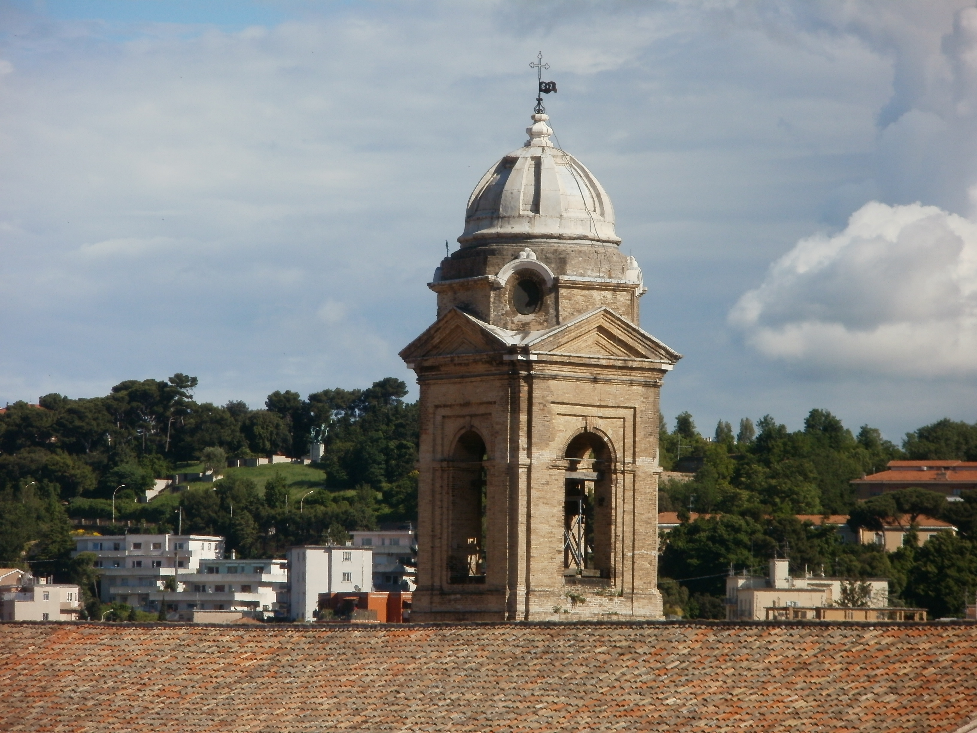 Chiesa di San Domenico - campanile This is a photo of a monument which is part of cultural heritage of Italy.